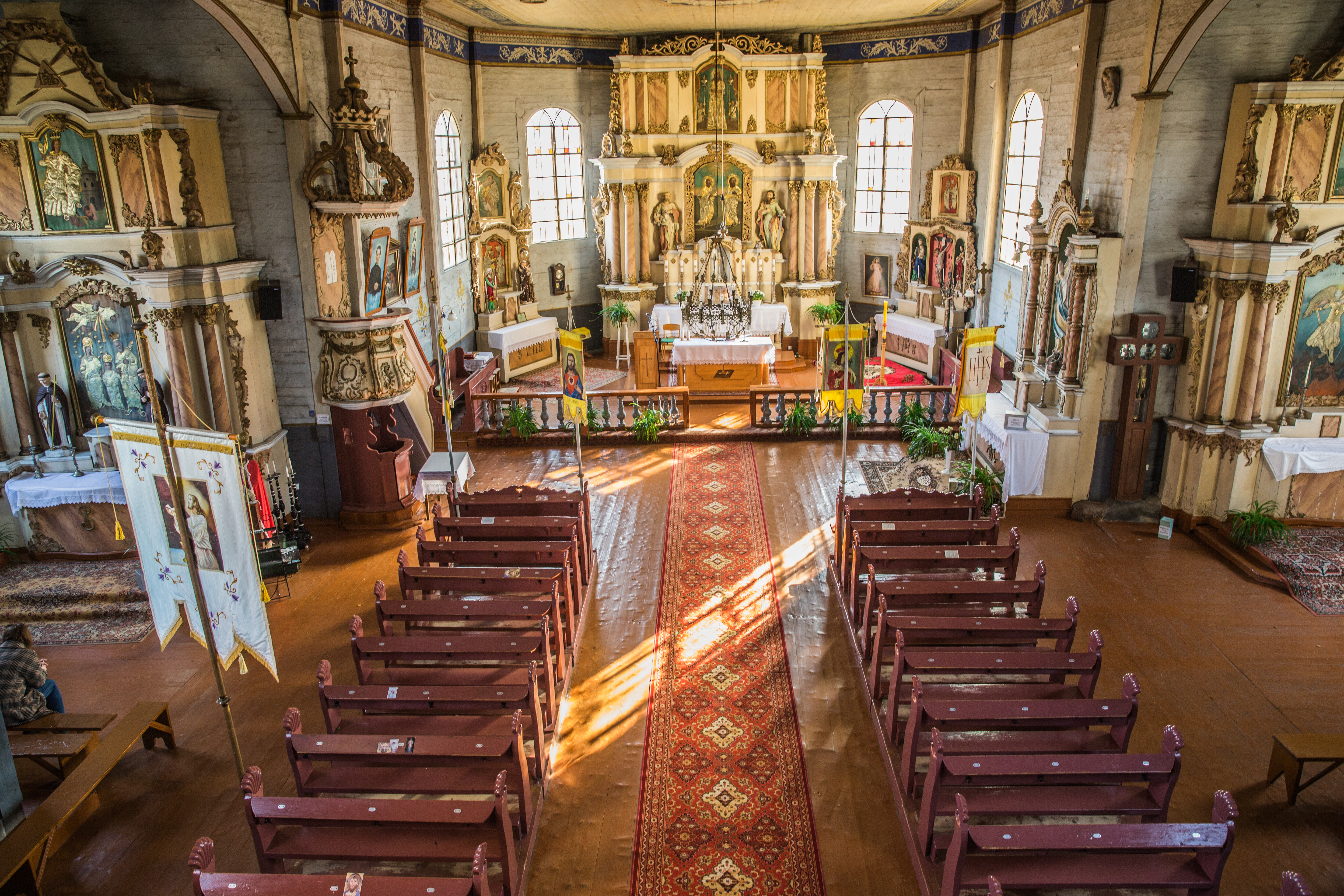 Šv. apaštalų Petro ir Pauliaus bažnyčios altorius